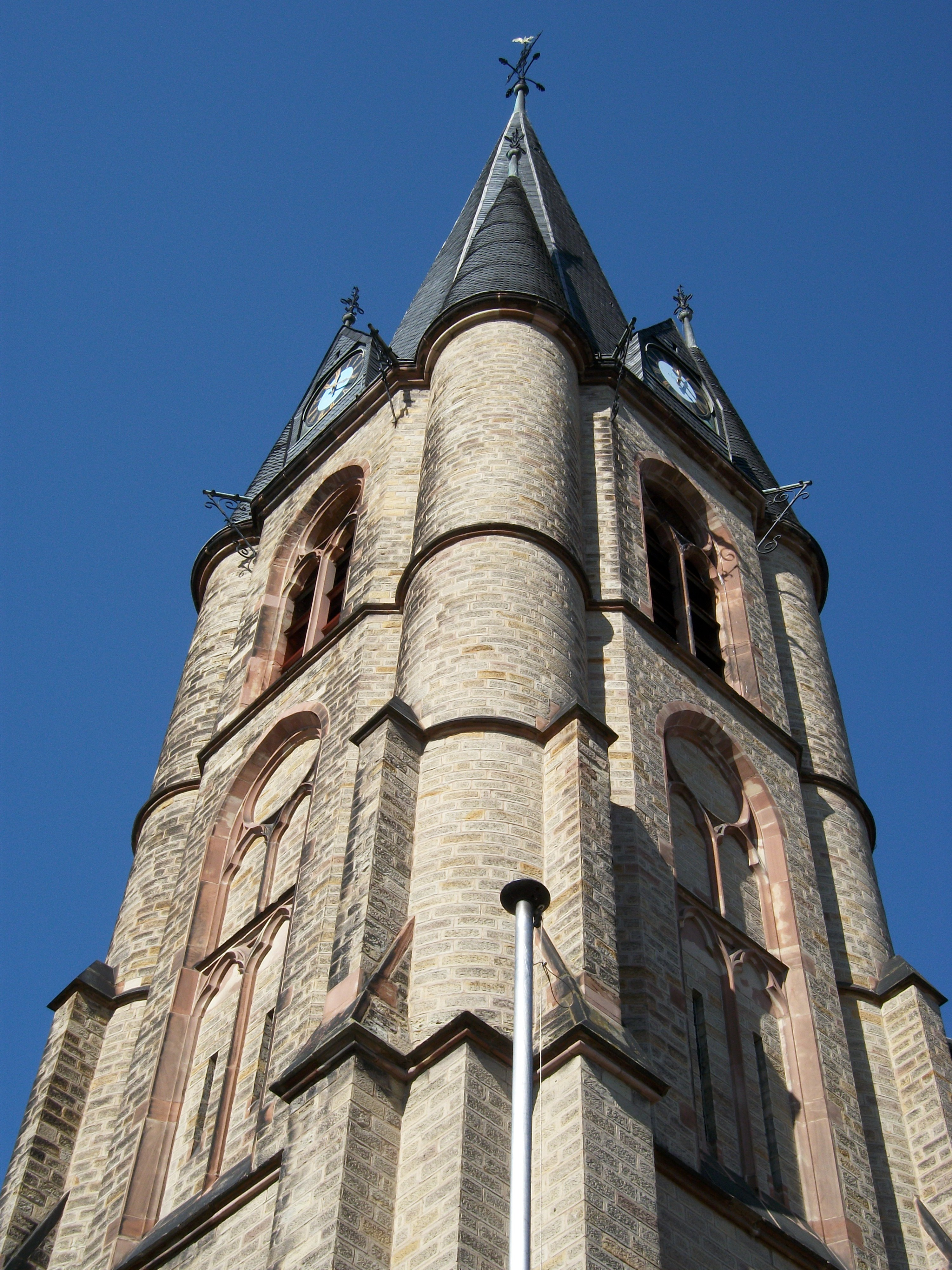 St. Jakob (Saarbrücken)